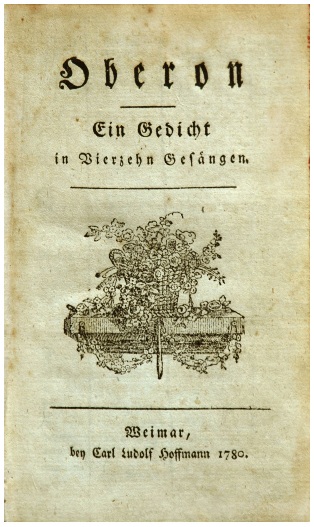 Titelblatt der Erstausgabe von Wieland "Oberon" 1780, hier noch ohne Nennung des Autors.